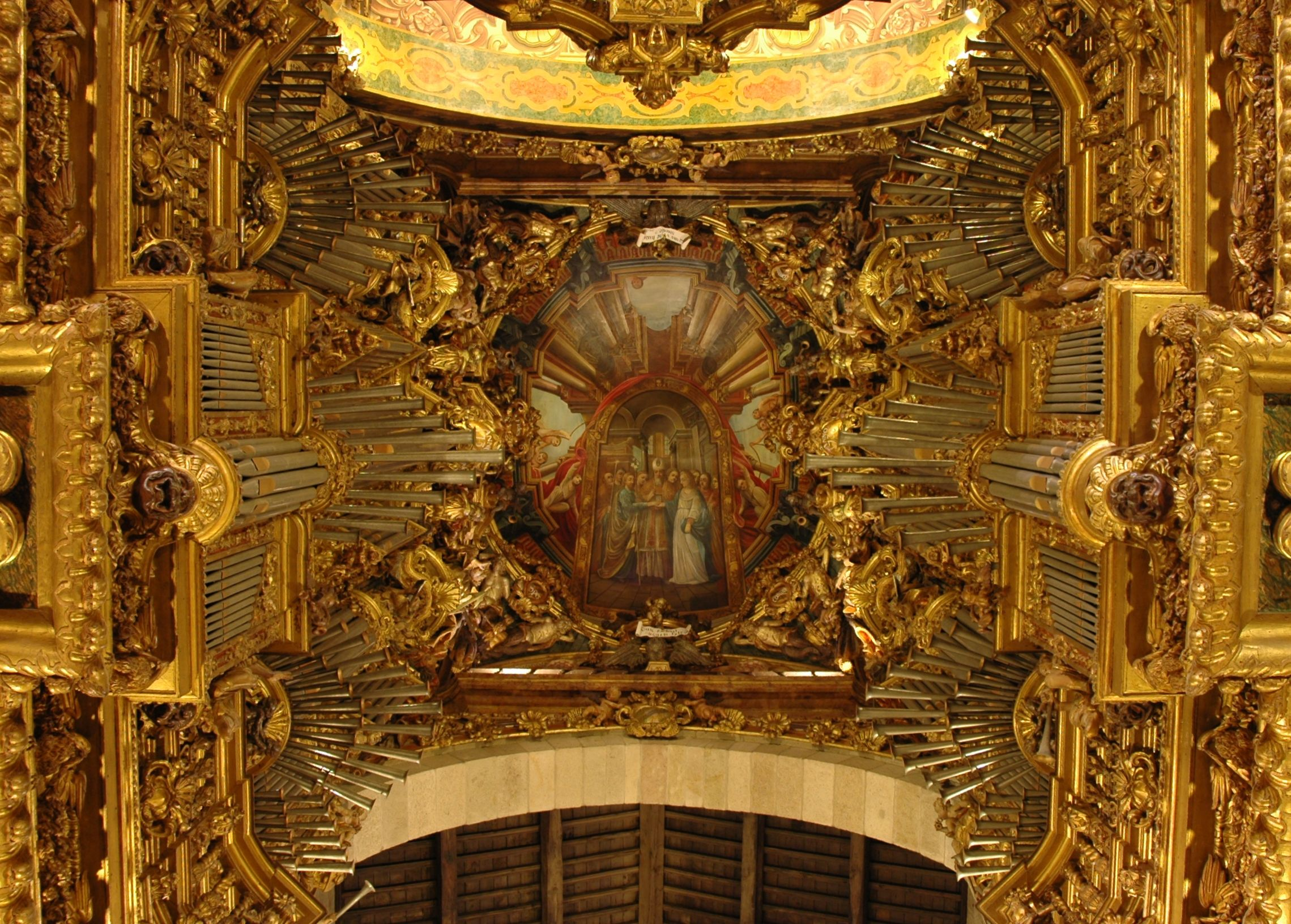 Catedral de Braga - Orgue vist des de sota